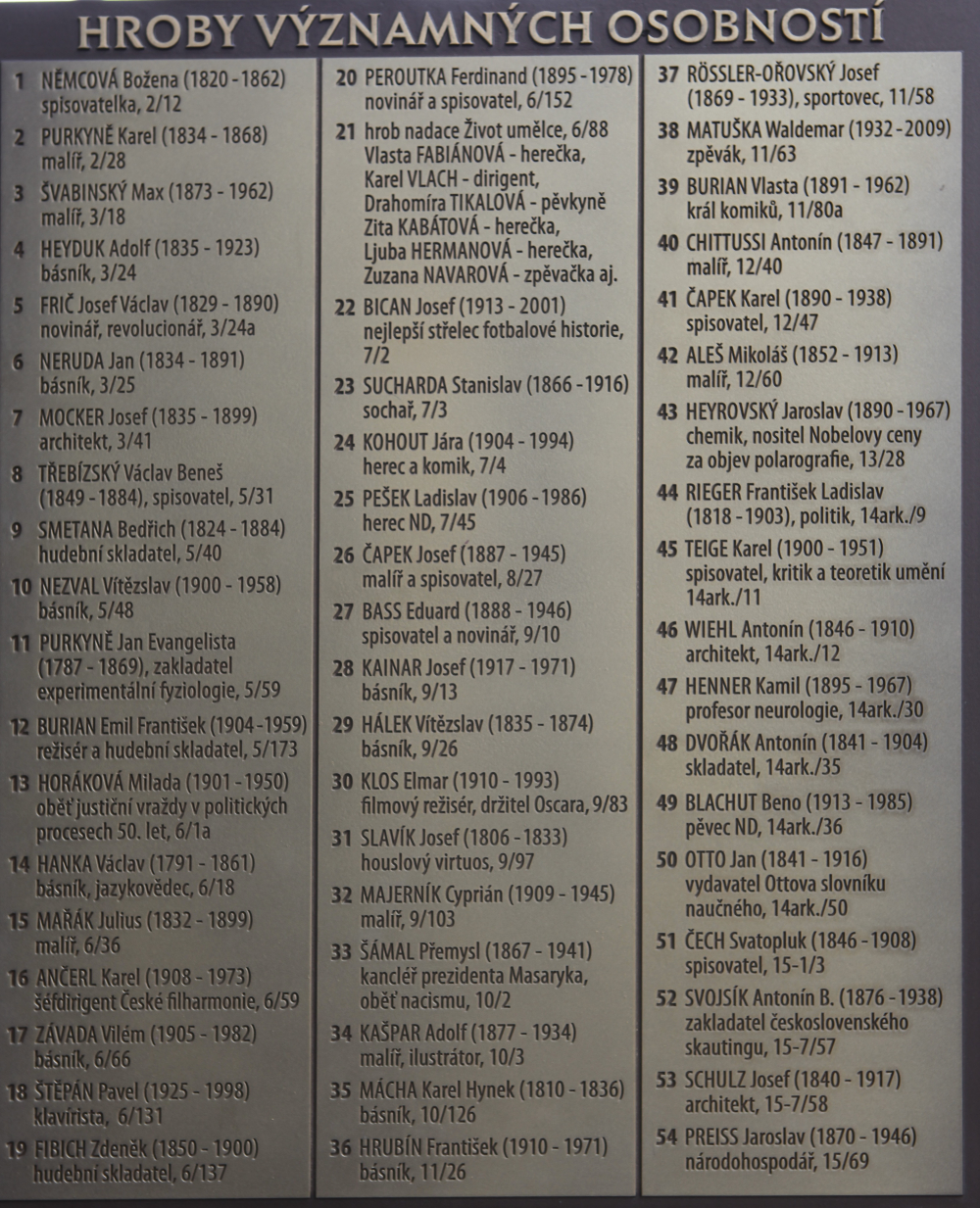 liste des défunts